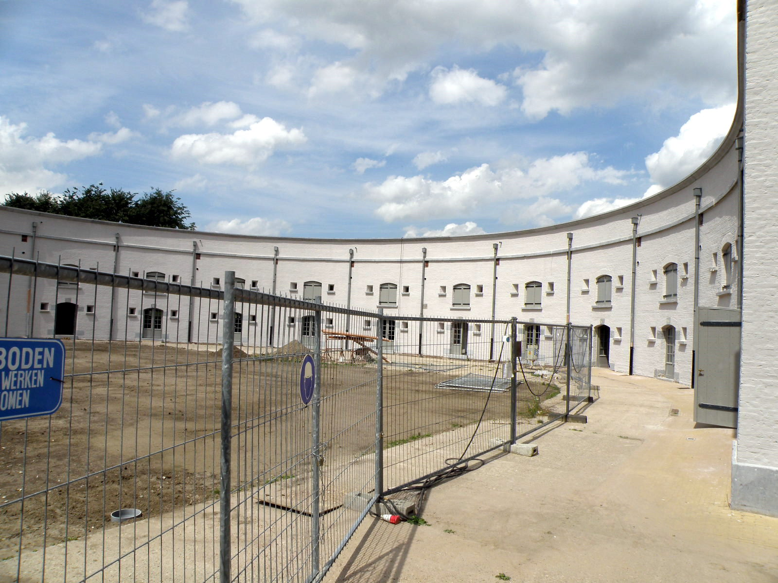 Fort Liefkenshoek, op linker Schelde-oever, gemeente Beveren (deelgem. Kallo), België. De 'kat' in het midden van het fort.